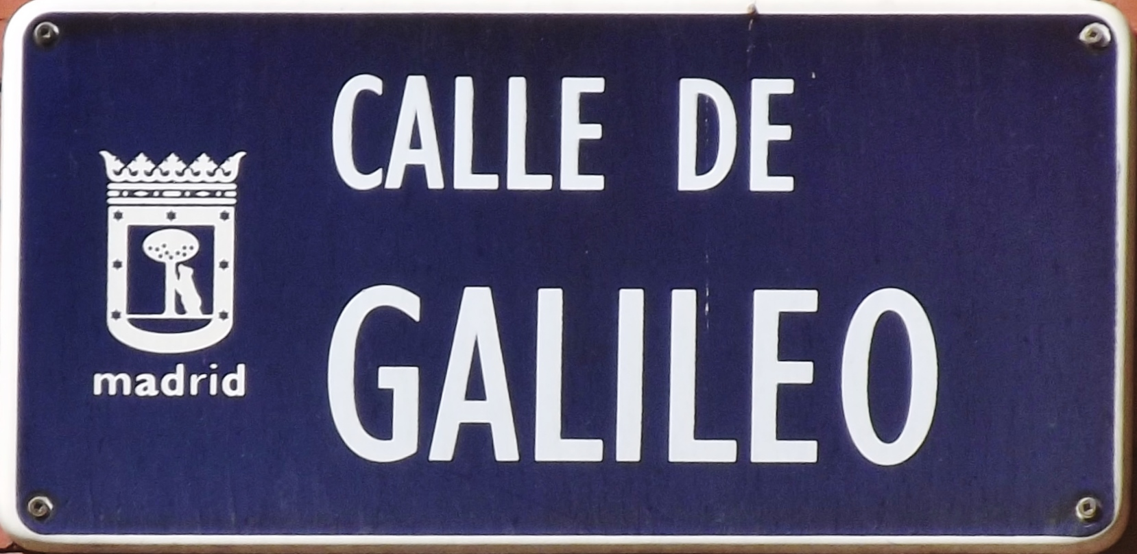 Placa de la Calle de Galileo, Madrid.